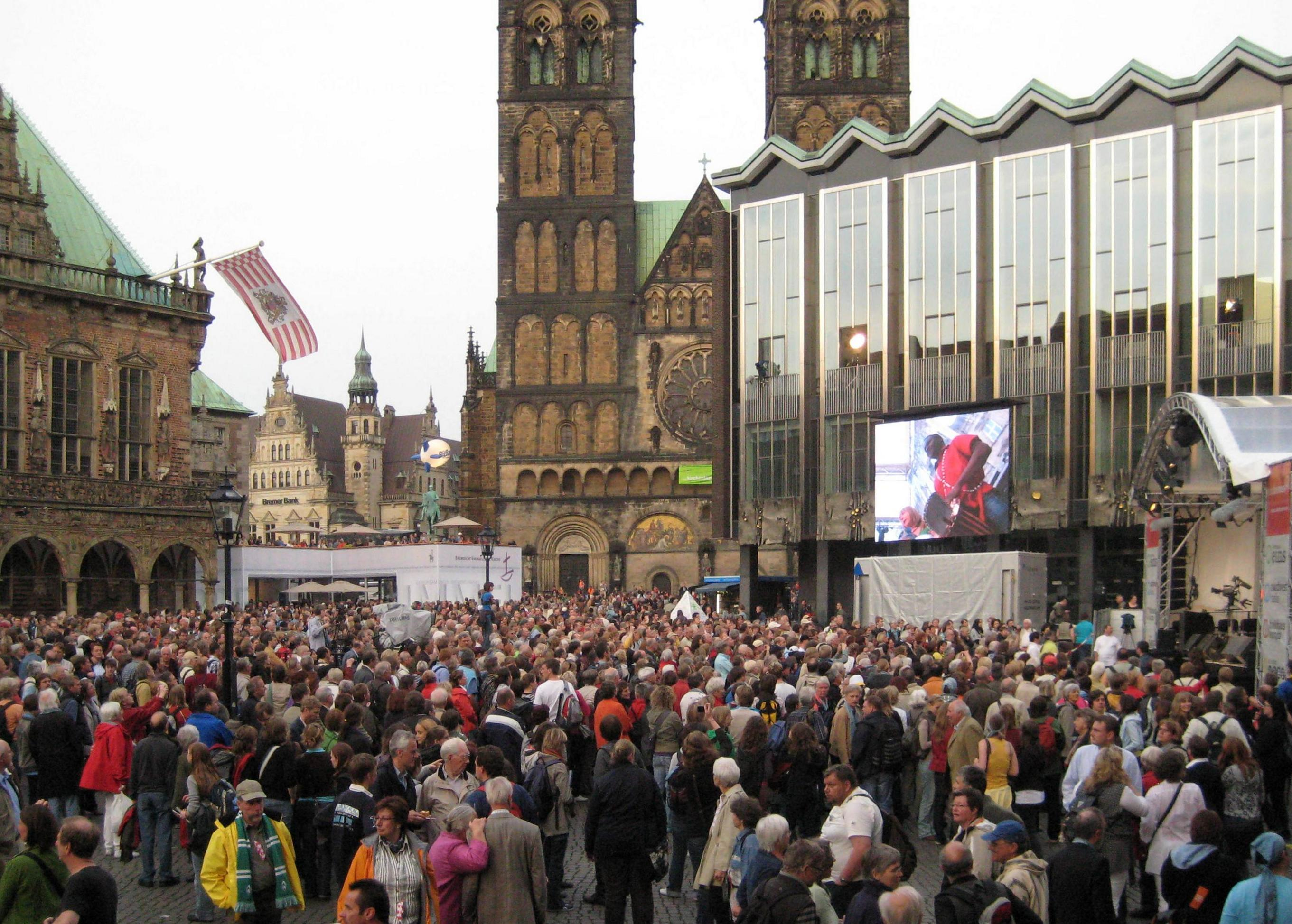 32. Deutscher Evangelischer Kirchentag in Bremen, "Abend der Begegnung", Marktplatz: Musikprogramm "Oh, Happy Day" (Gospels & Spirituals)